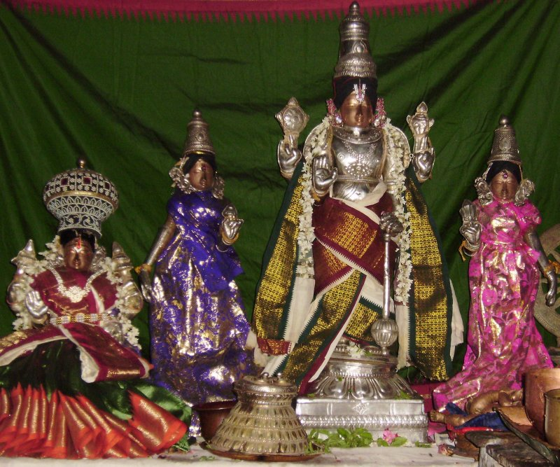 KrubaSamudraPerumal_1